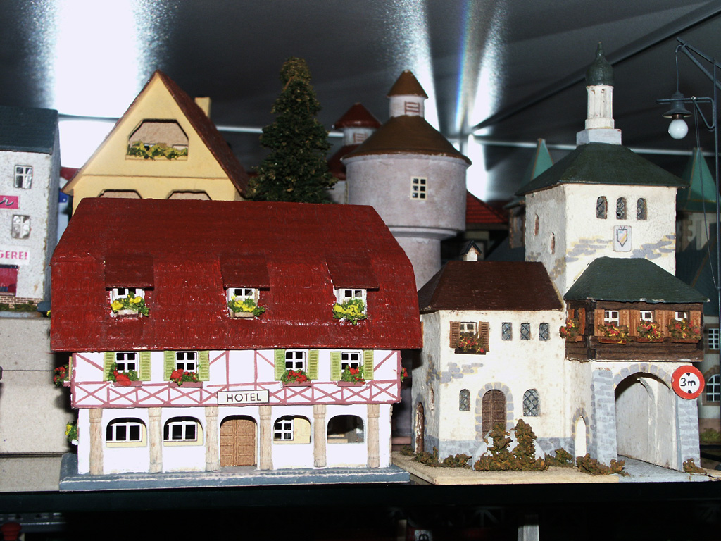 Modellbauten der Marke RS (Dr. Rudolf Spitaler), Bad Kissingen